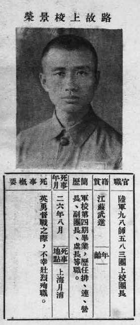 抗戰軍人忠烈錄第一輯中的烈士遺像